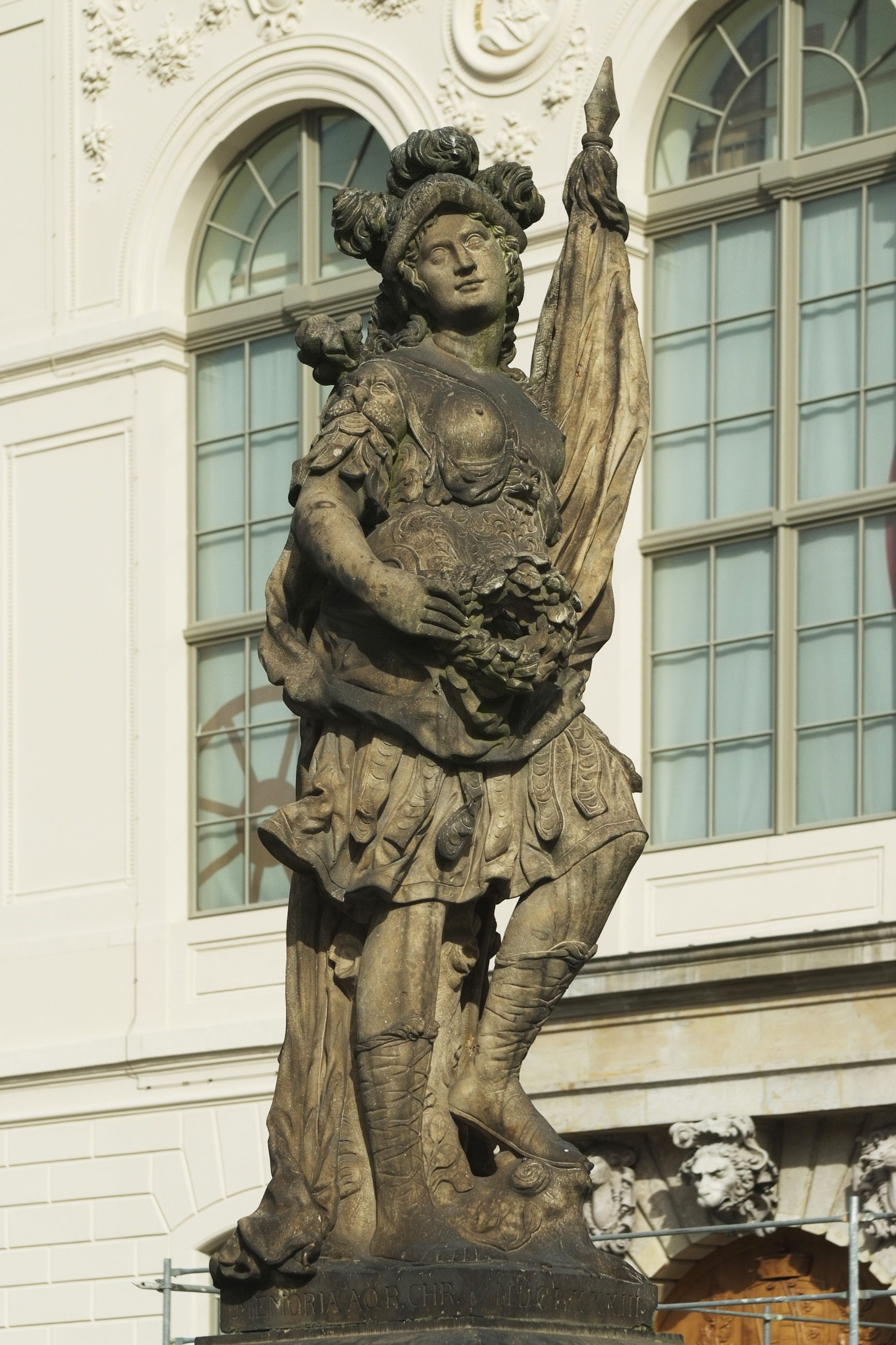 Dresden, Friedensbrunnen auf dem Neumarkt. Ansicht von Südosten